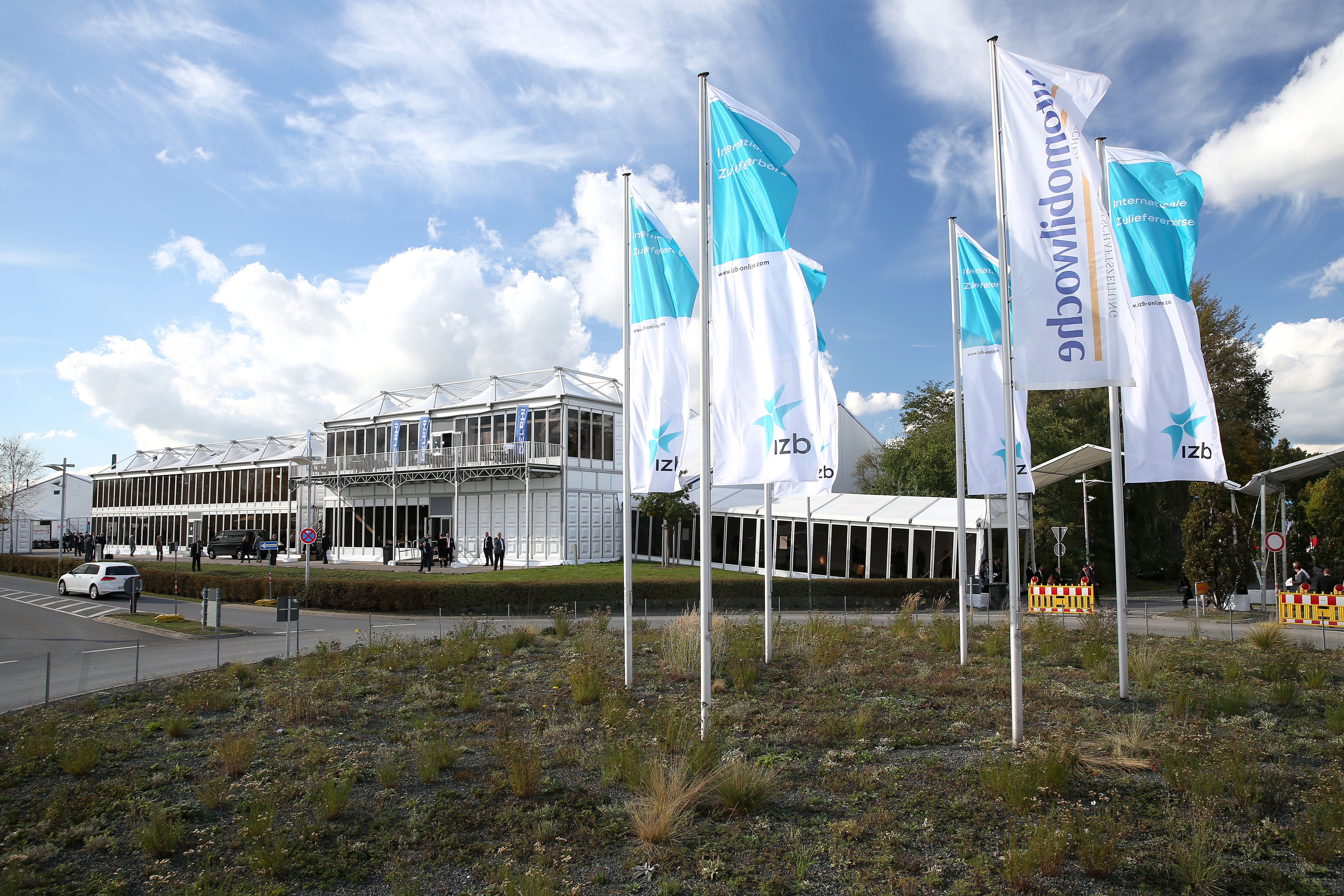 Internationale Zuliefererbörse (IZB) 2014 in Wolfsburg, ausgerichtet von der Wolfsburg AG